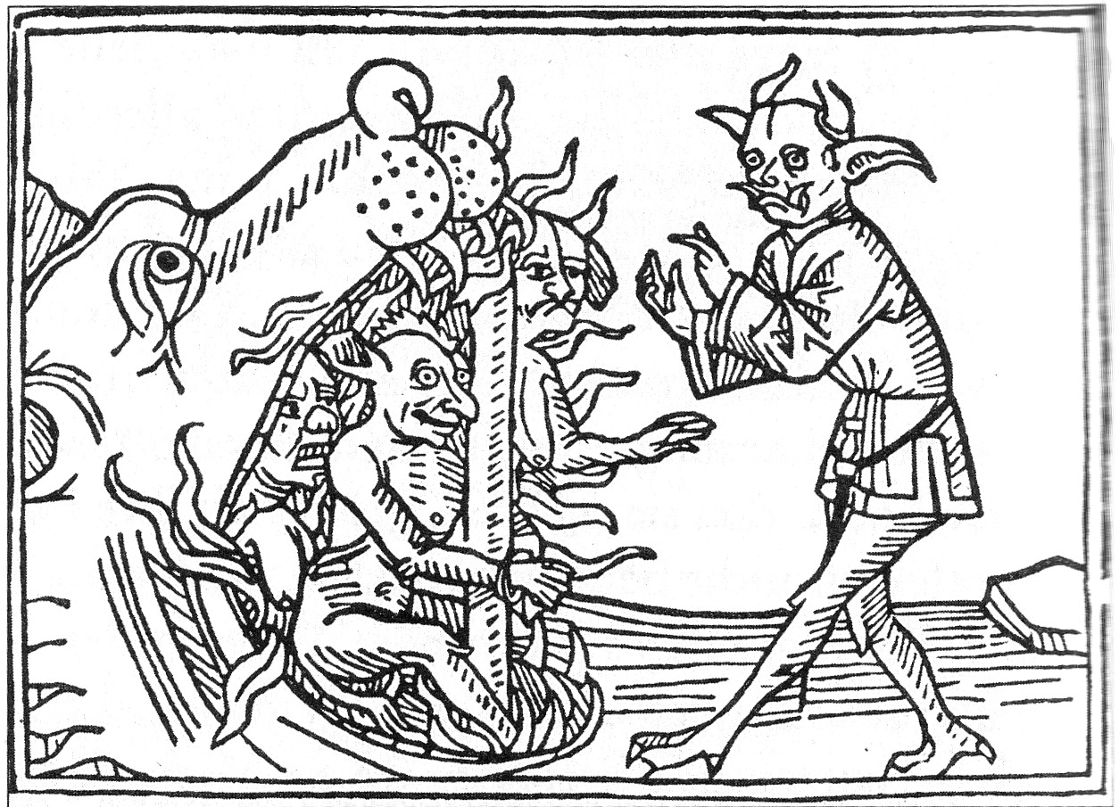 Belial in Holzschnitt, Augsburg 1473 (aus "Lexikon der Monster, Geister und Dämonen" von Felix Bormann)